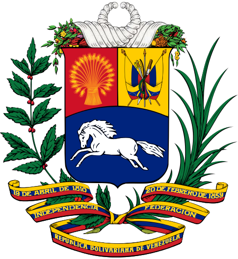 Escudo de Armas de la República Bolivariana de Venezuela. Aprobado en Gaceta Oficial número 38.394 del 9 de marzo de 2006. Es el escudo oficial de Venezuela hasta el presente.